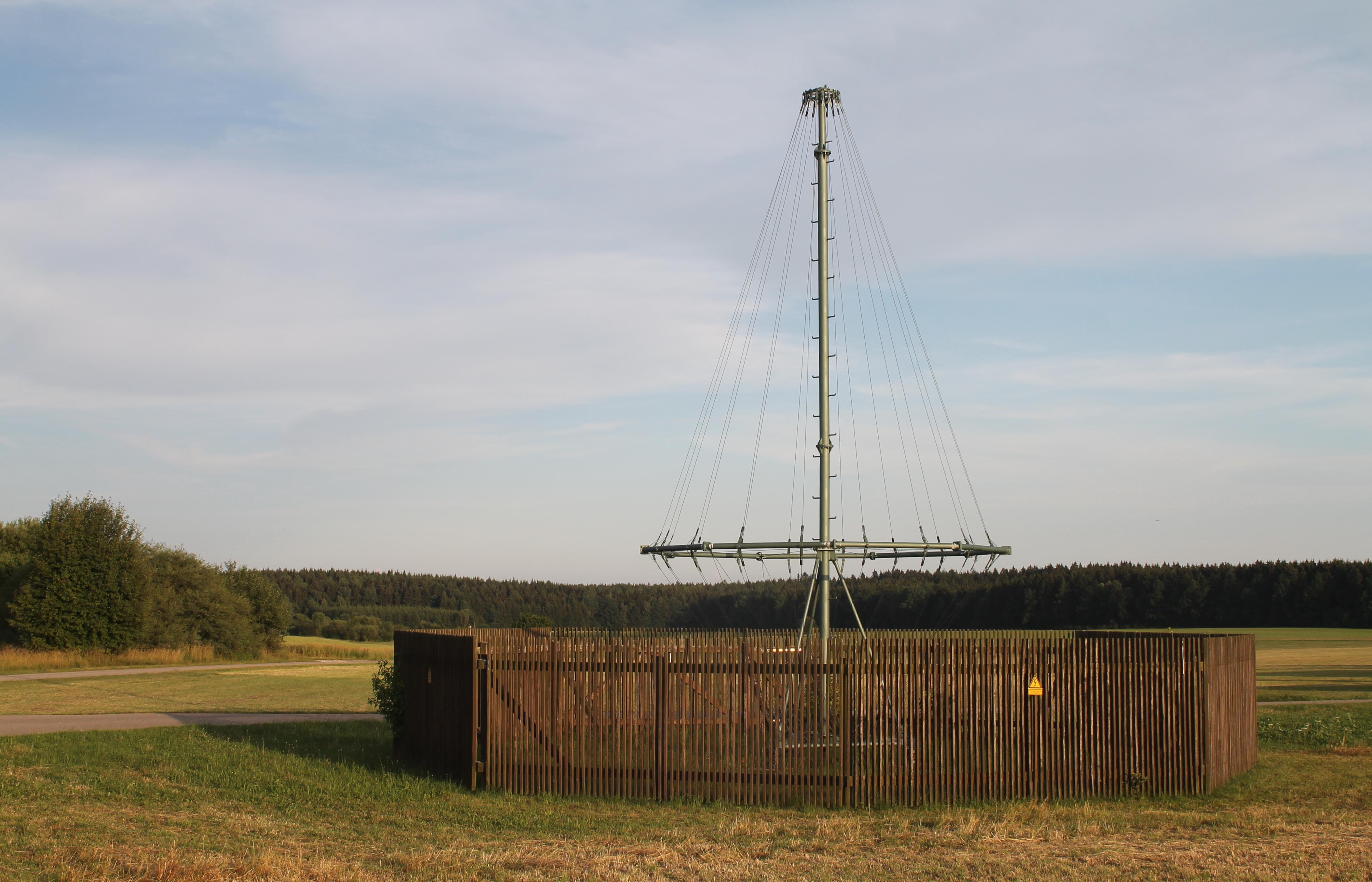 Reusenantenne des einstigen Kurzwellensenders des Bodenseesenders